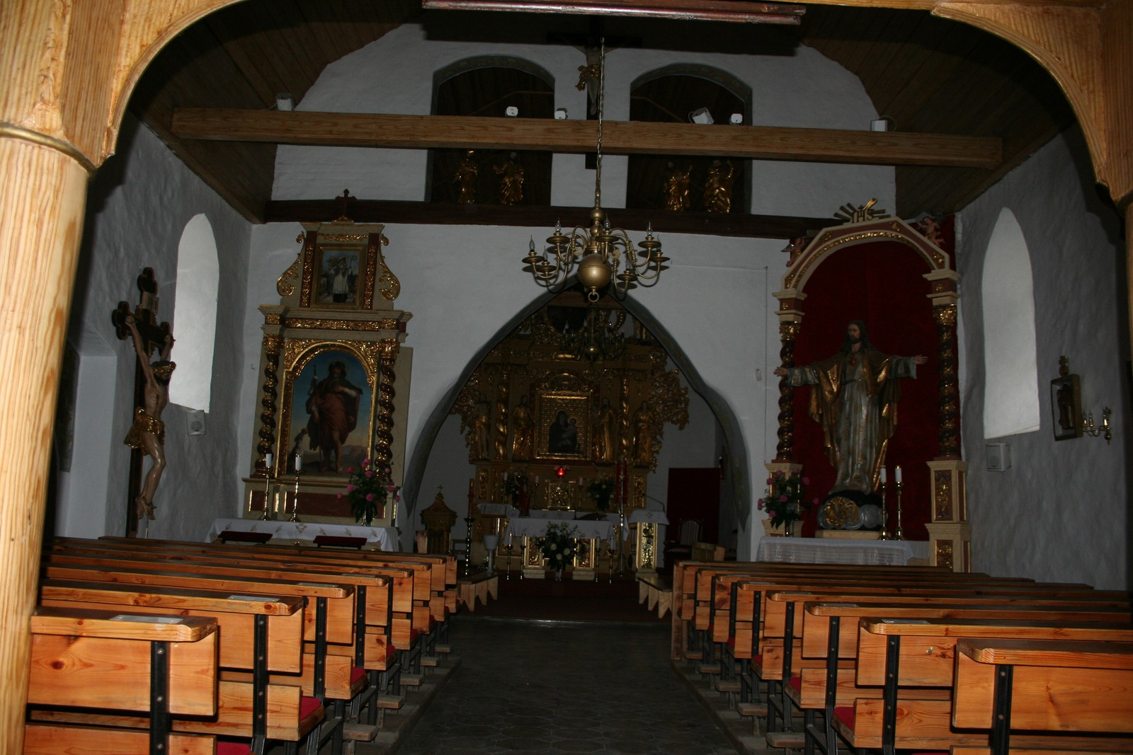 Trzebcz Szlachecki - gotycki kościół pw. Wniebowzięcia NMP, zbudowany na pocz. XIV w.